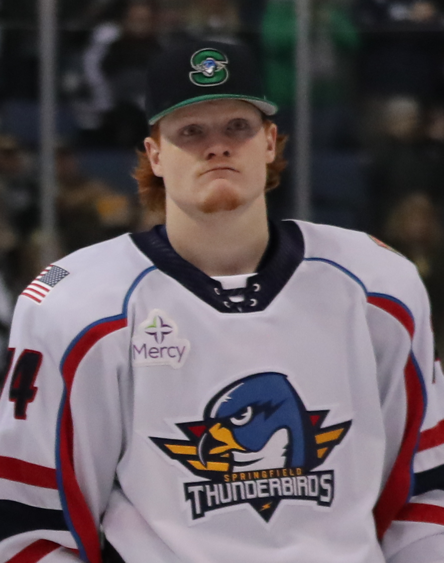 AA3I0596